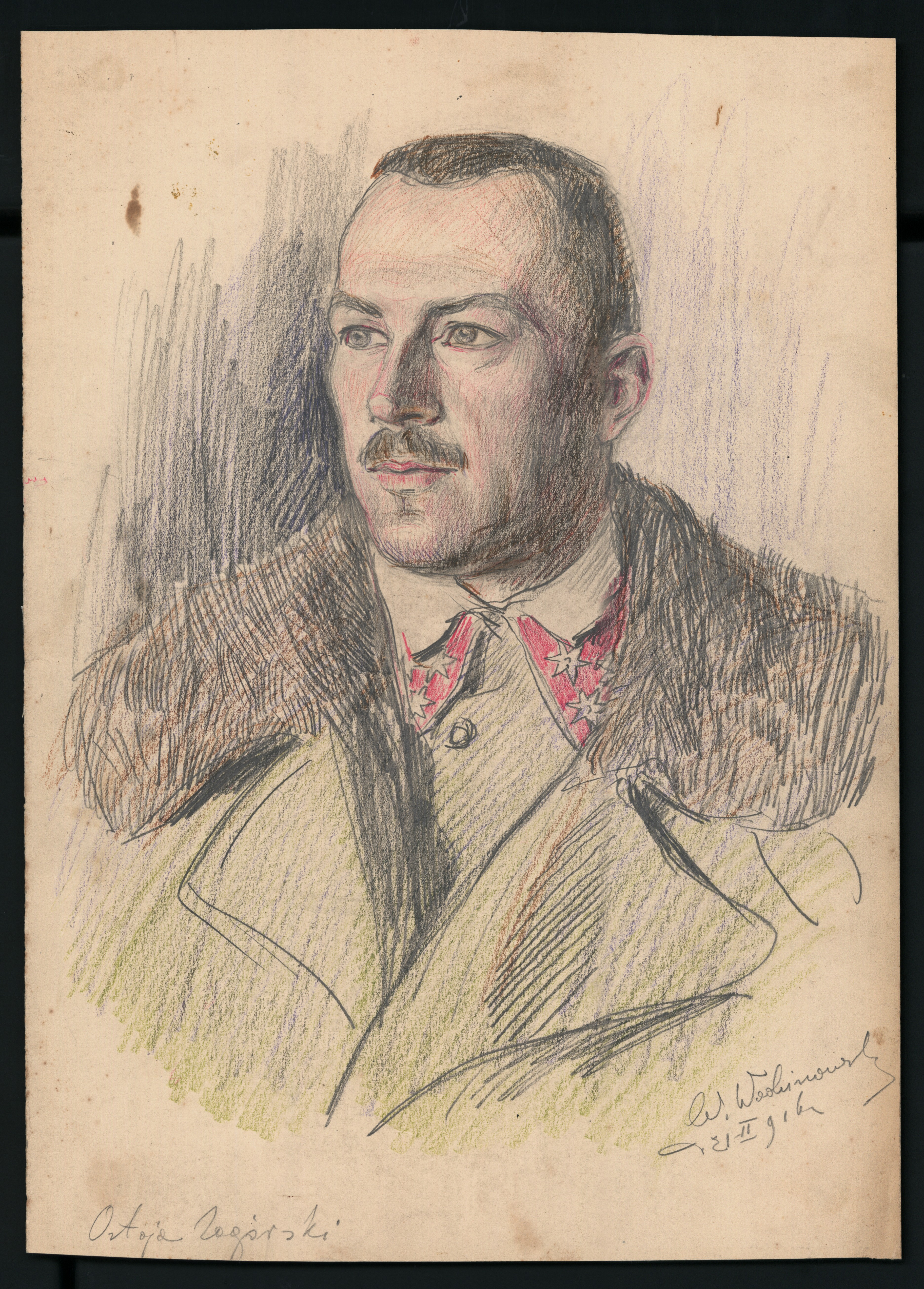 Rysunek ołówkiem: "Ostoja Zagórski". Autor Wincenty Wodzinowski. Data na rysunku: 21.02.1916.